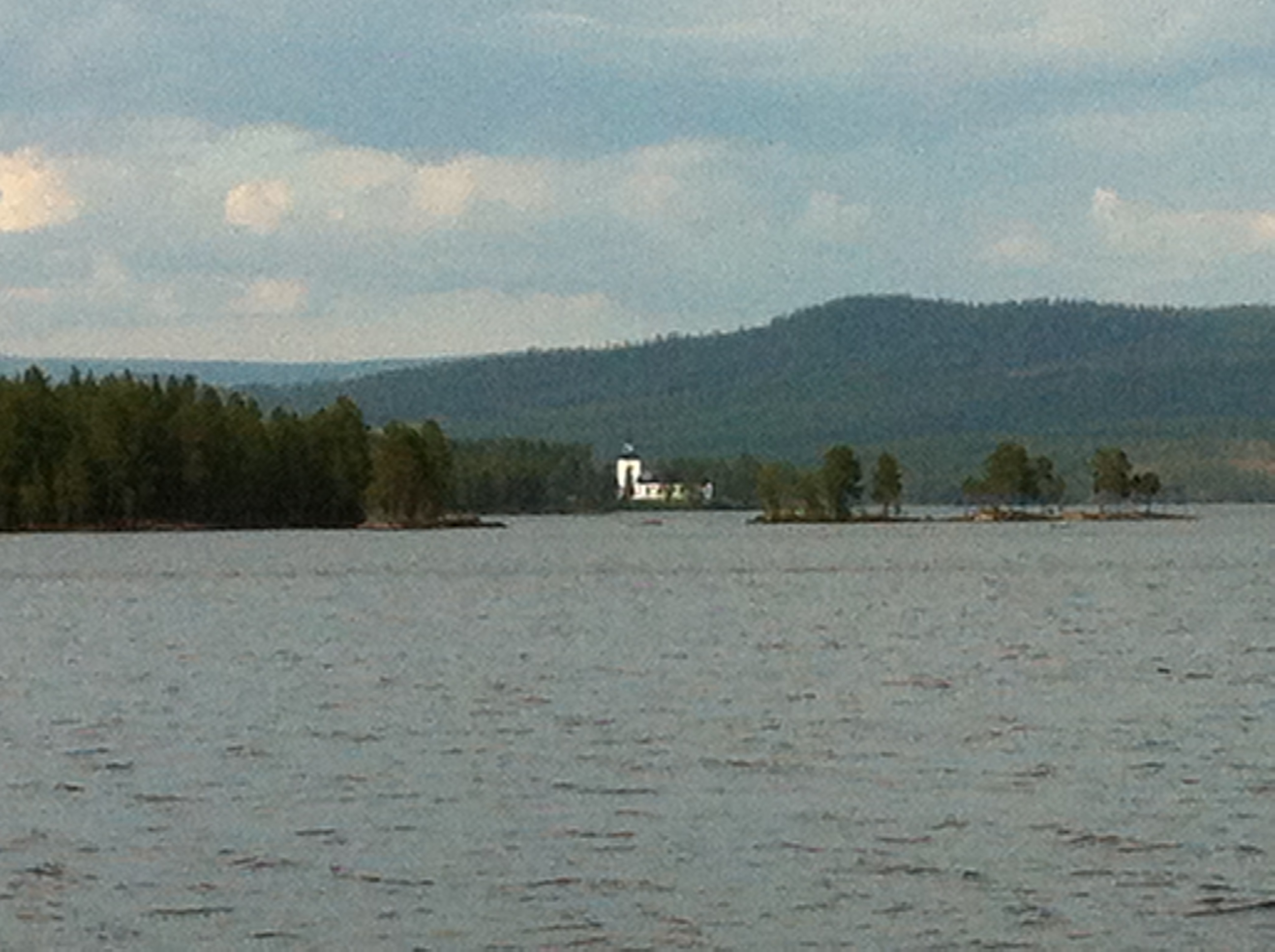 Kyrkan i Hotagen